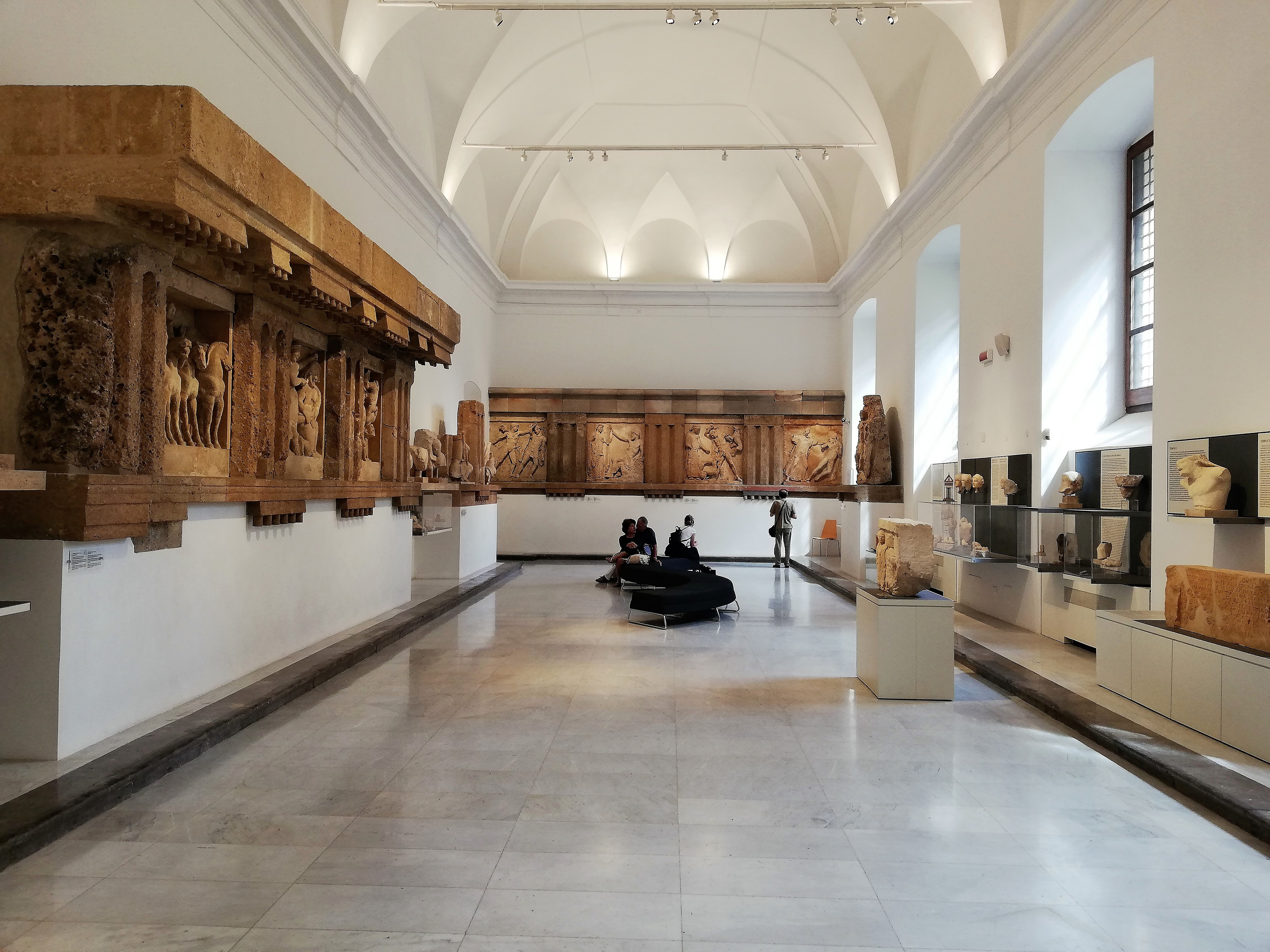 Raccolta